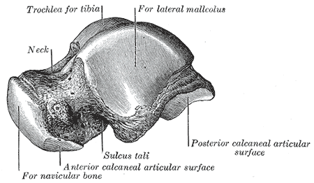 FIG. 273– Left talus, lateral surface.